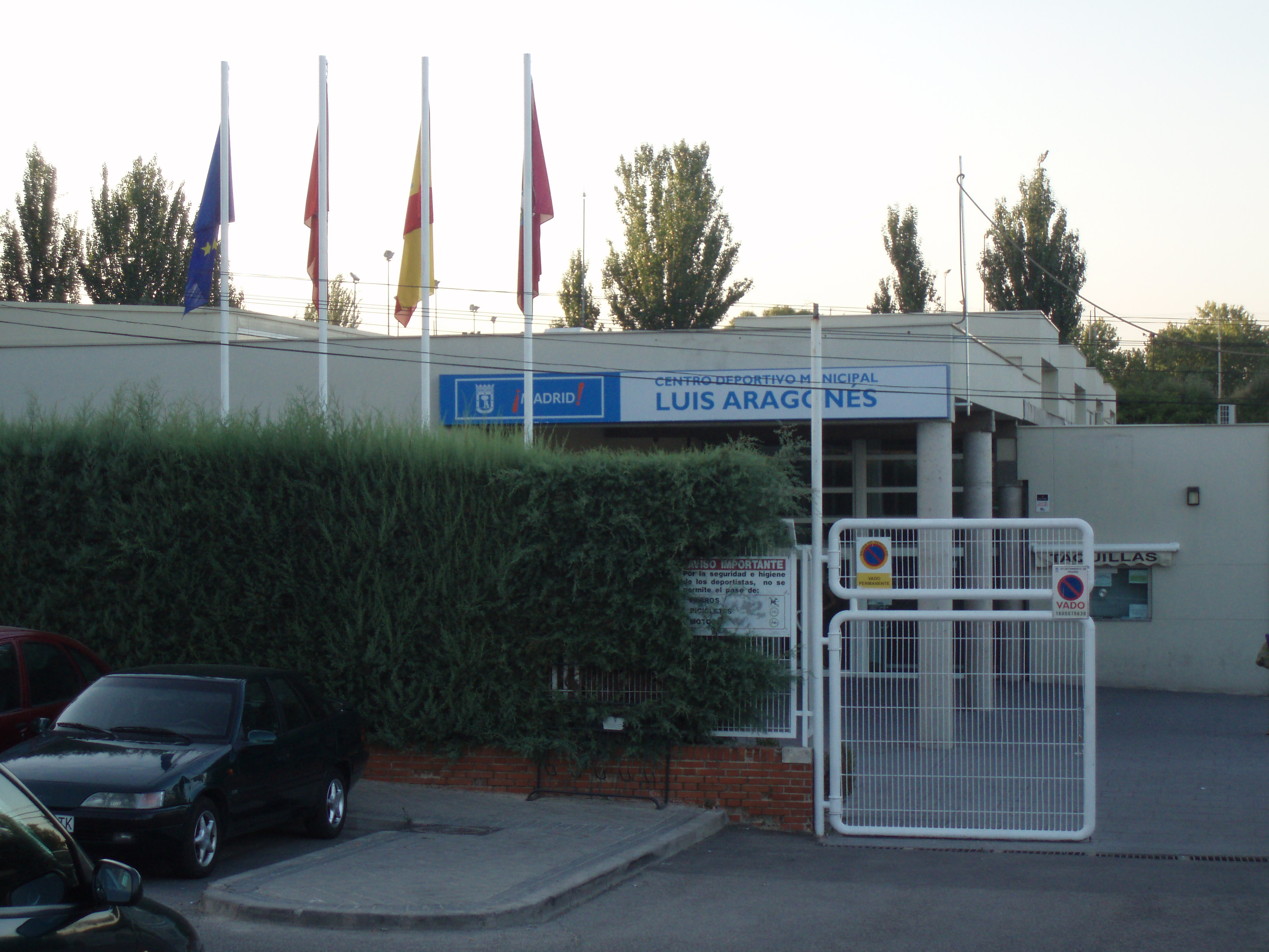 Polideportivo Luis Aragonés